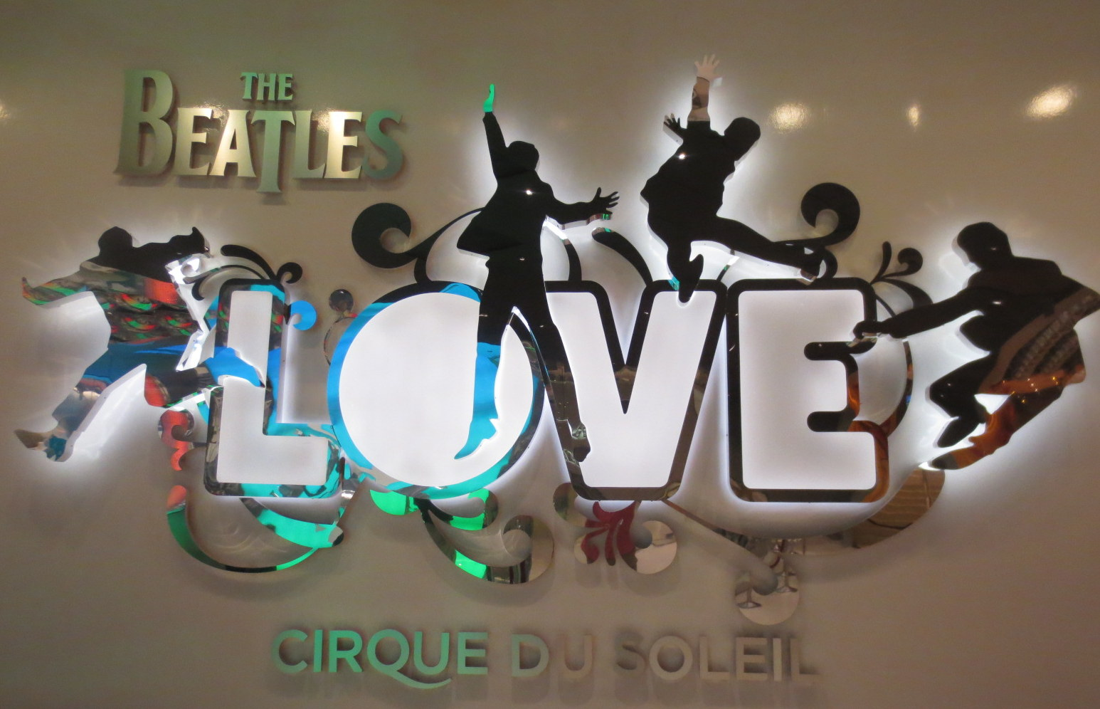 Affiche permanente de Love à Las Vegas dans le foyer du théâtre au Mirage.